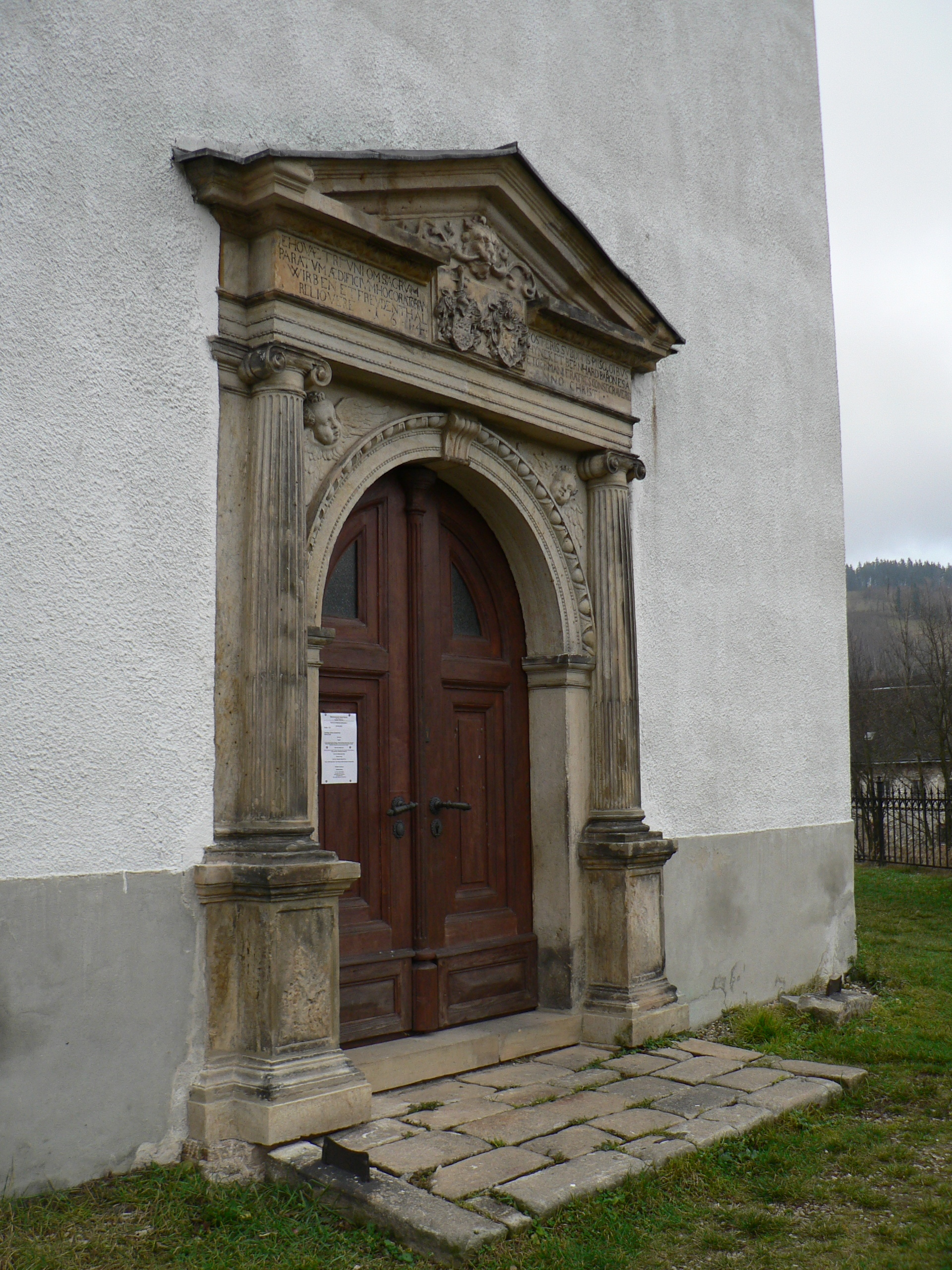 Kostel Archanděla Michaela (Branná), portál